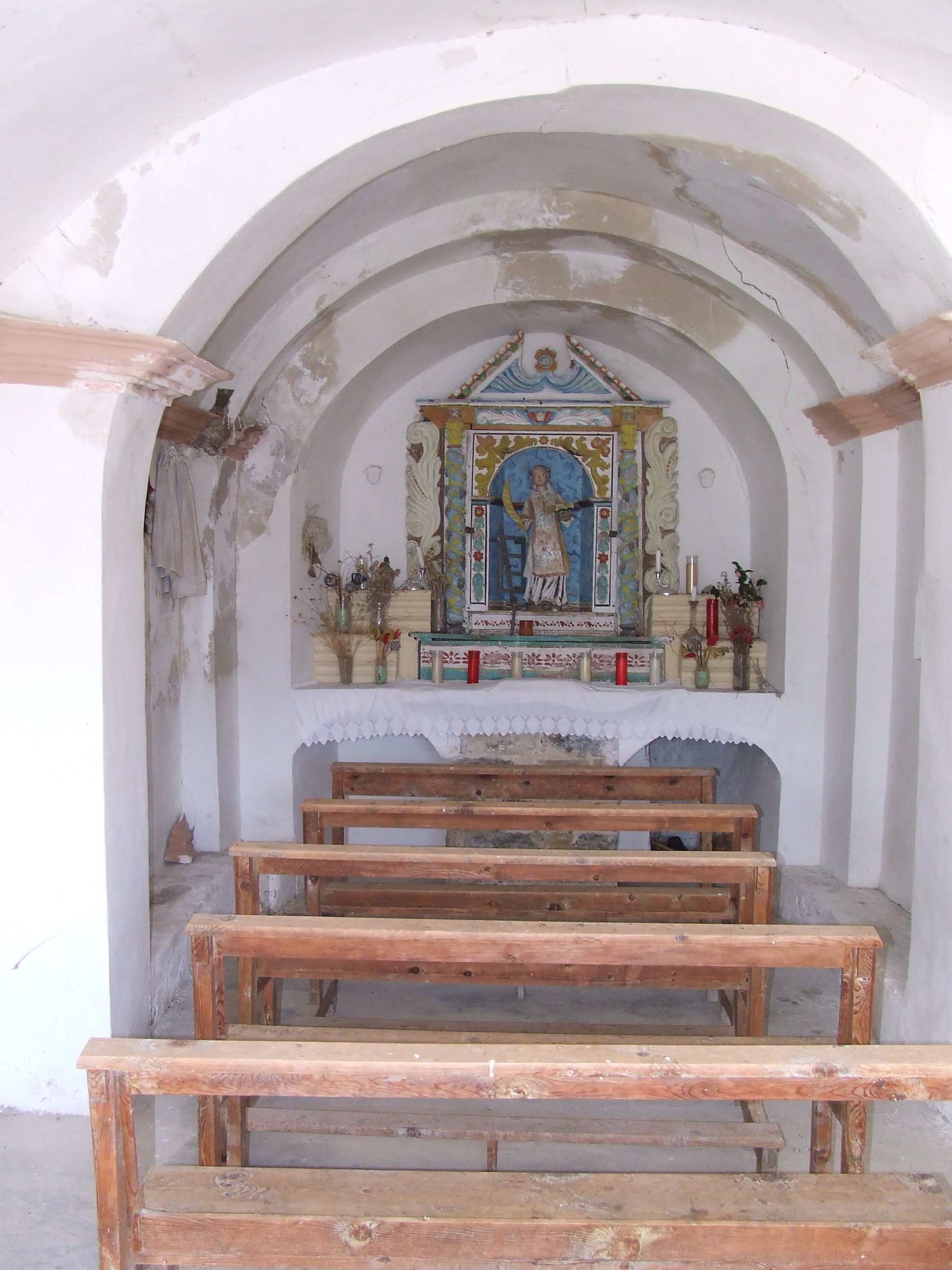 Interior de Sant Llorenç de Sant Adrià (Gurp de la Conca, Tremp, Pallars Jussà)